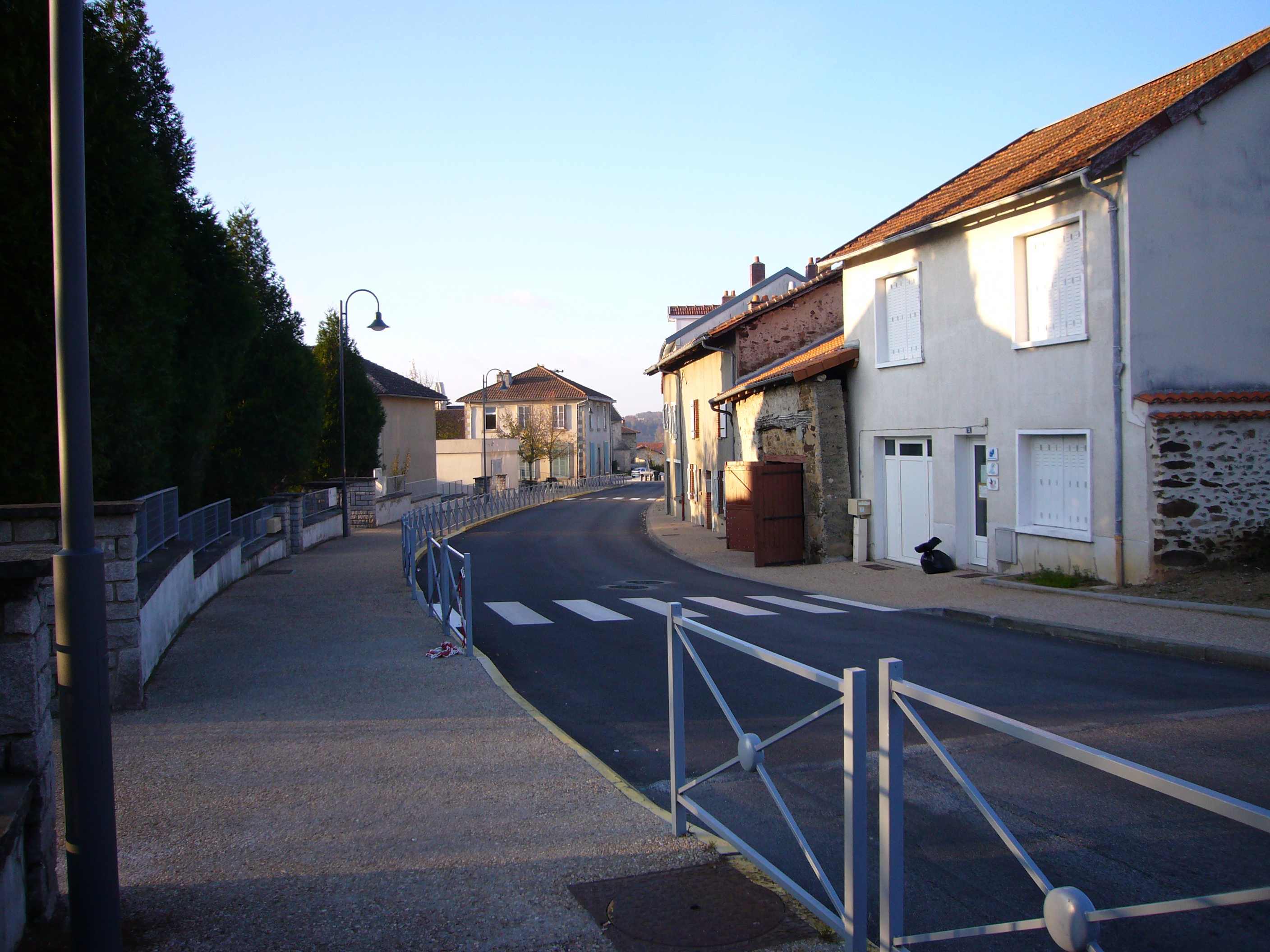 La rue Turgot à Panazol (87, France)